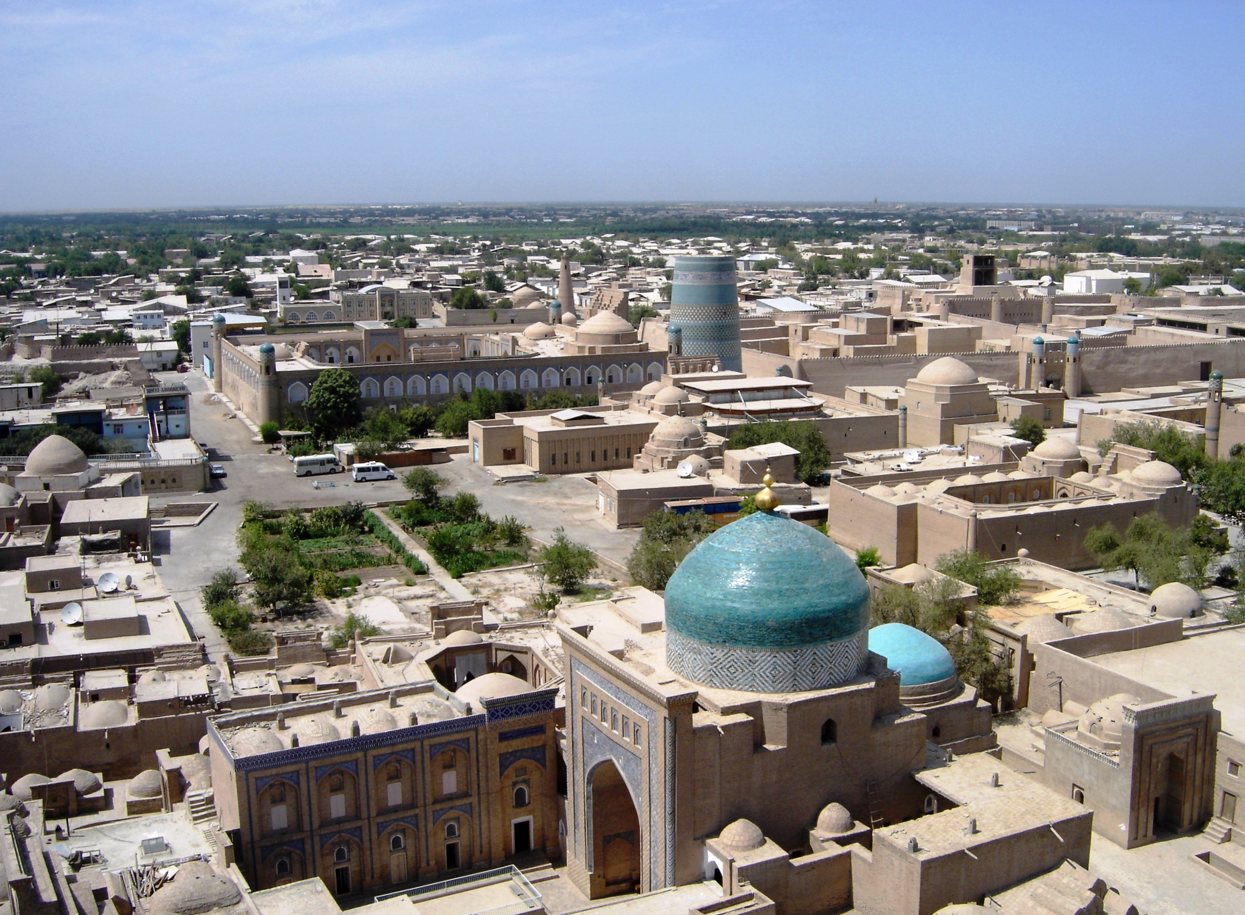 Vue générale de Khyva